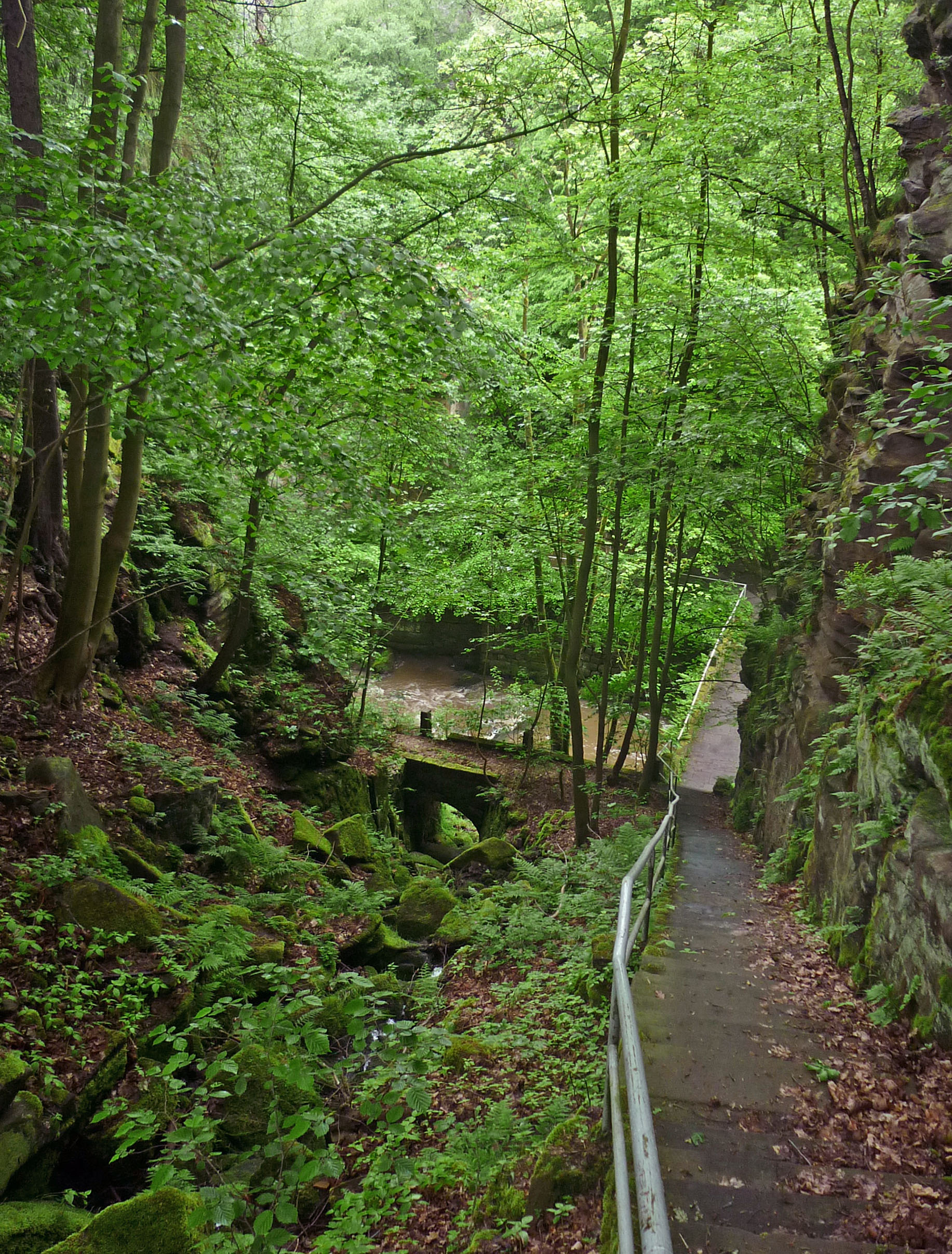 Daube-Schlucht, Abstieg zum Liebethaler Grund bei Lohmen (Sachsen)